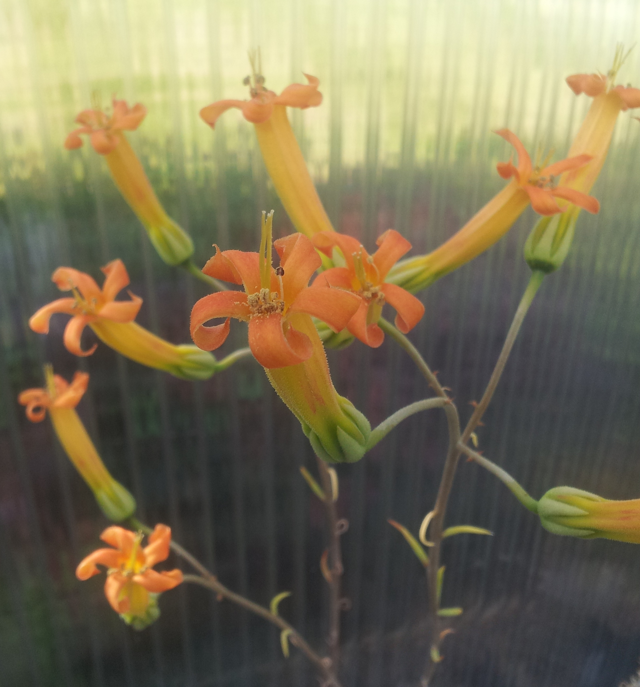 Tylecodon grandiflorus, Einzelblüten und Blütenstand an Kultur-Pflanze